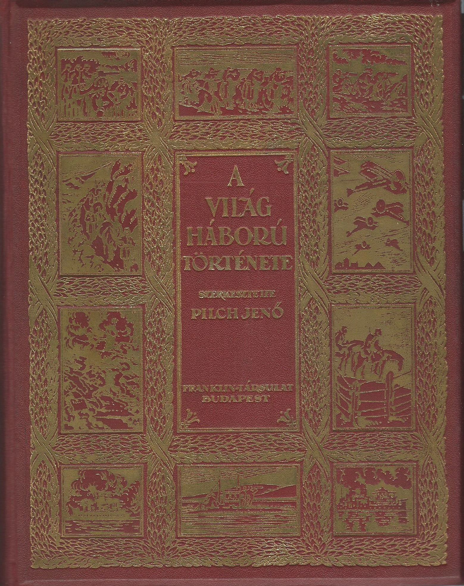 Pilch Jenő: A világháború története c. munkájának borítója